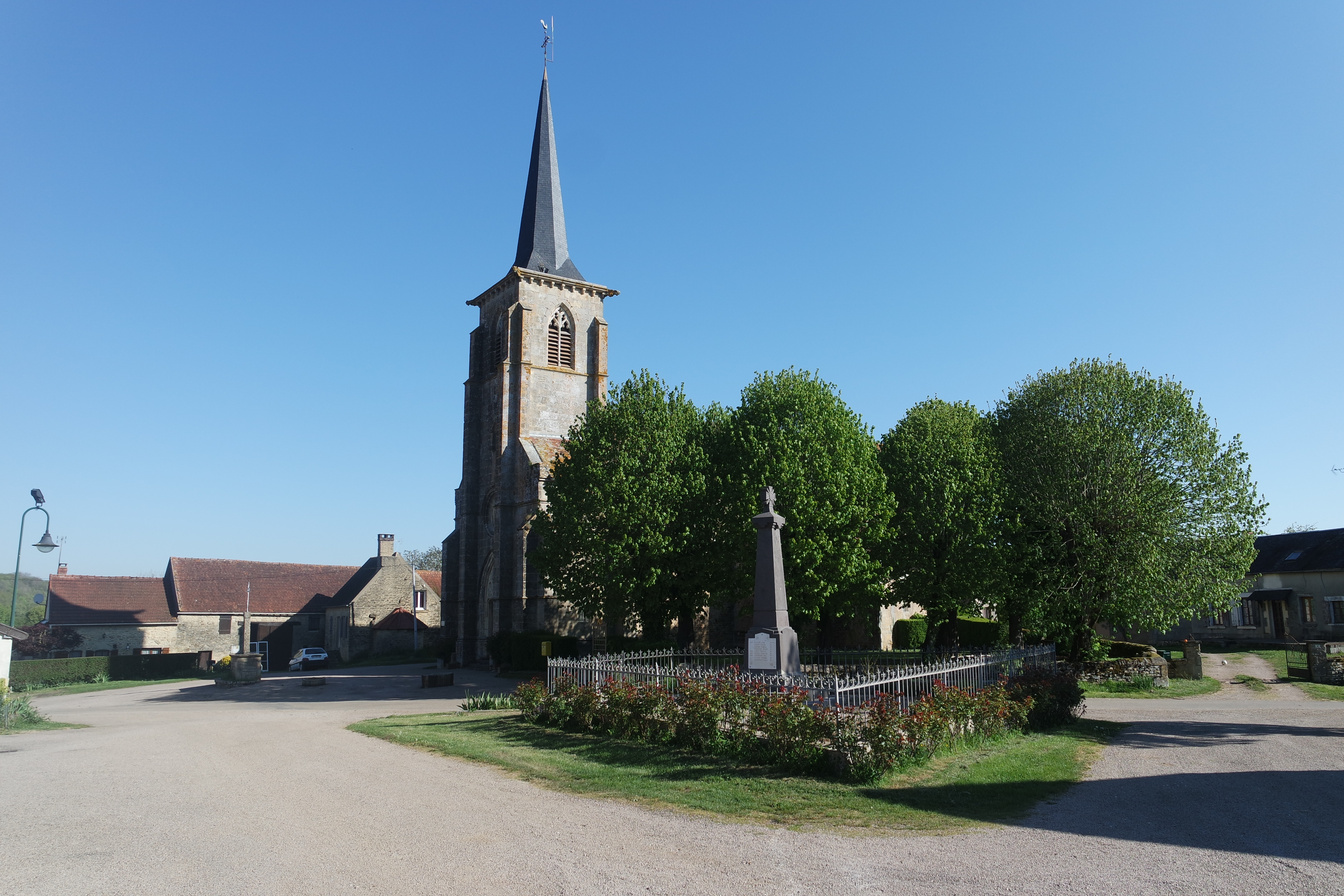 L'église Saint-Martin, le monument aux morts, un calvaire, à Neuilly. Département de la Nièvre. France.